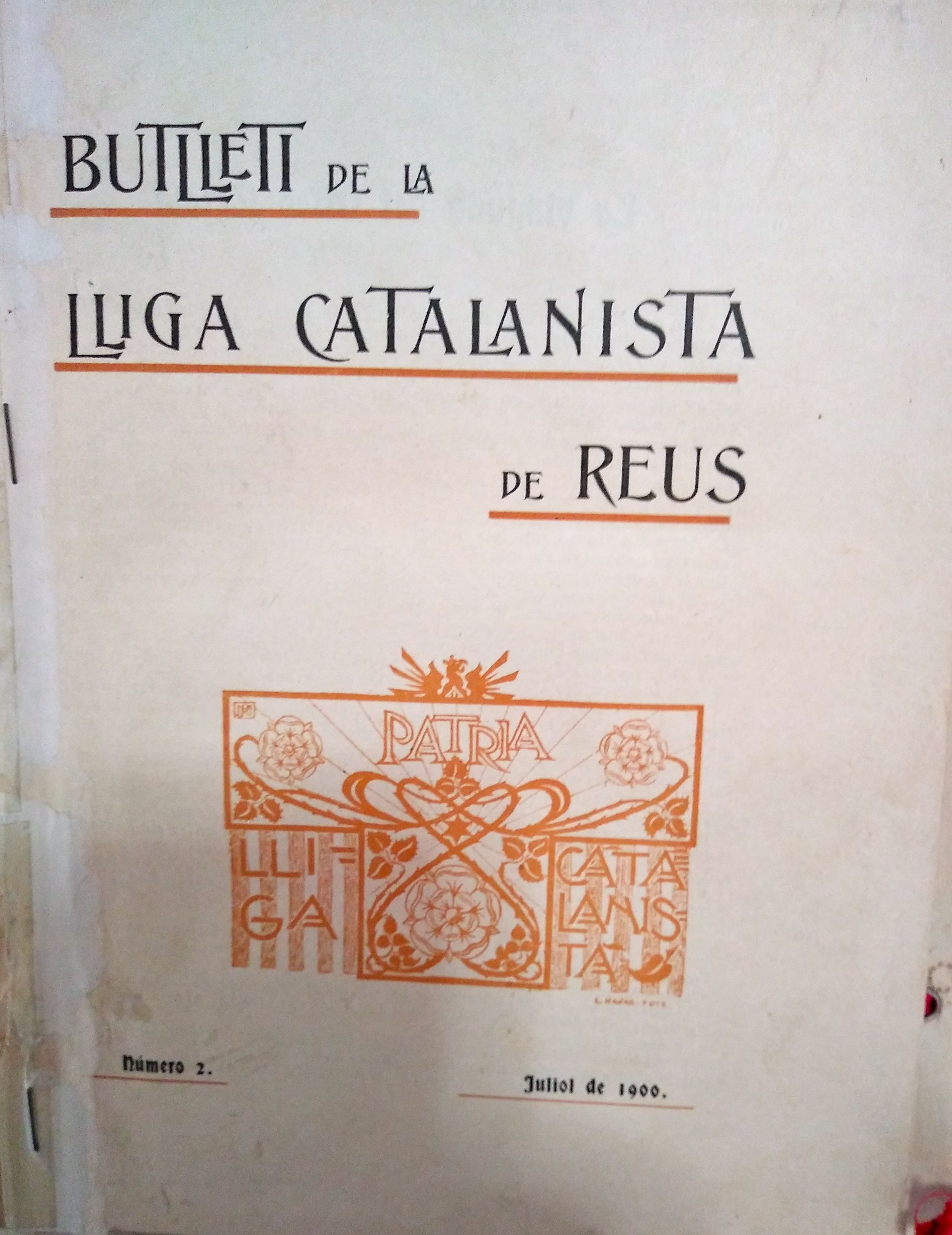 Butlletí de la Lliga Catalanista, sortit a Reus l'any 1900